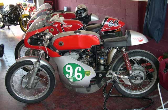 Bultaco. motocicletas clásicas de competición